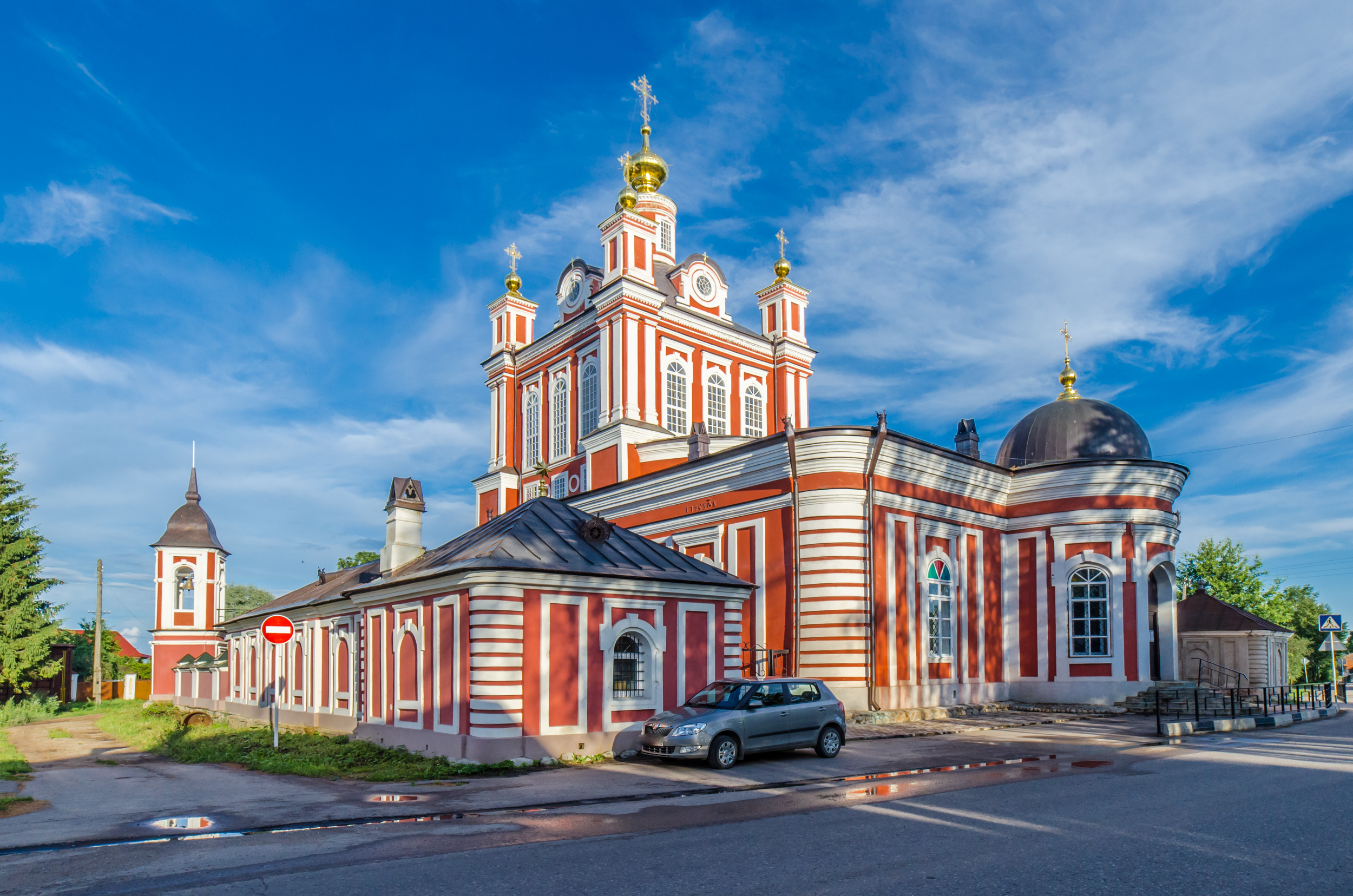 Ансамбль Корсунско-Богородицкого собора: улица Комсомольская, Торопец, Торопецкий район, Тверская область